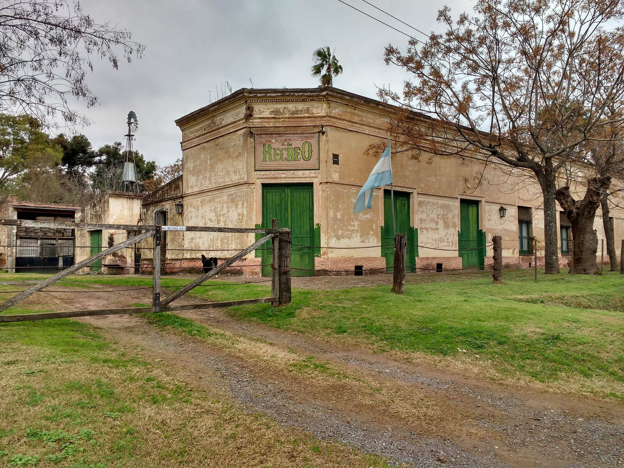 Vista global del edificio.